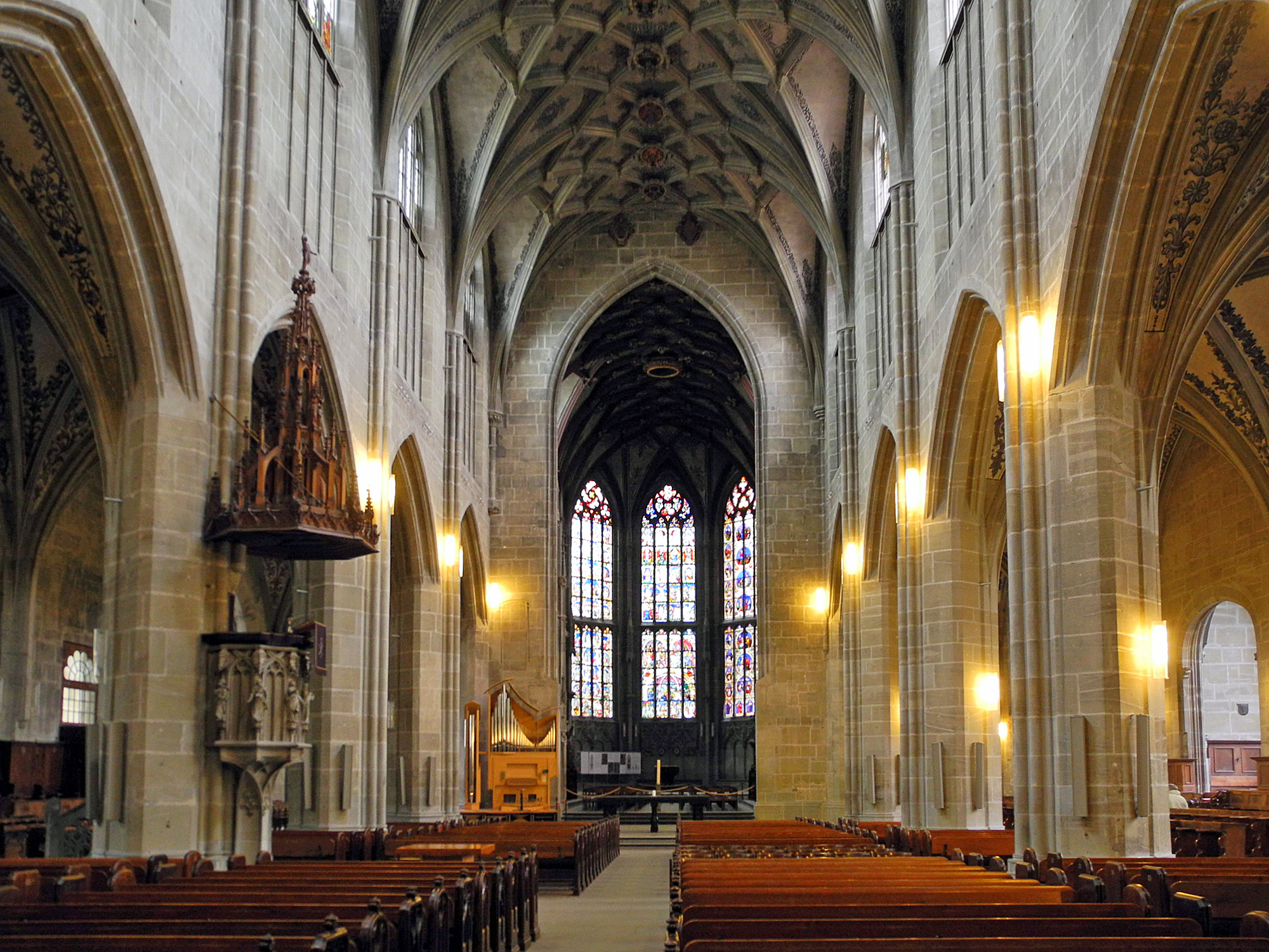 Berner Münster Langhaus gegen den Chor